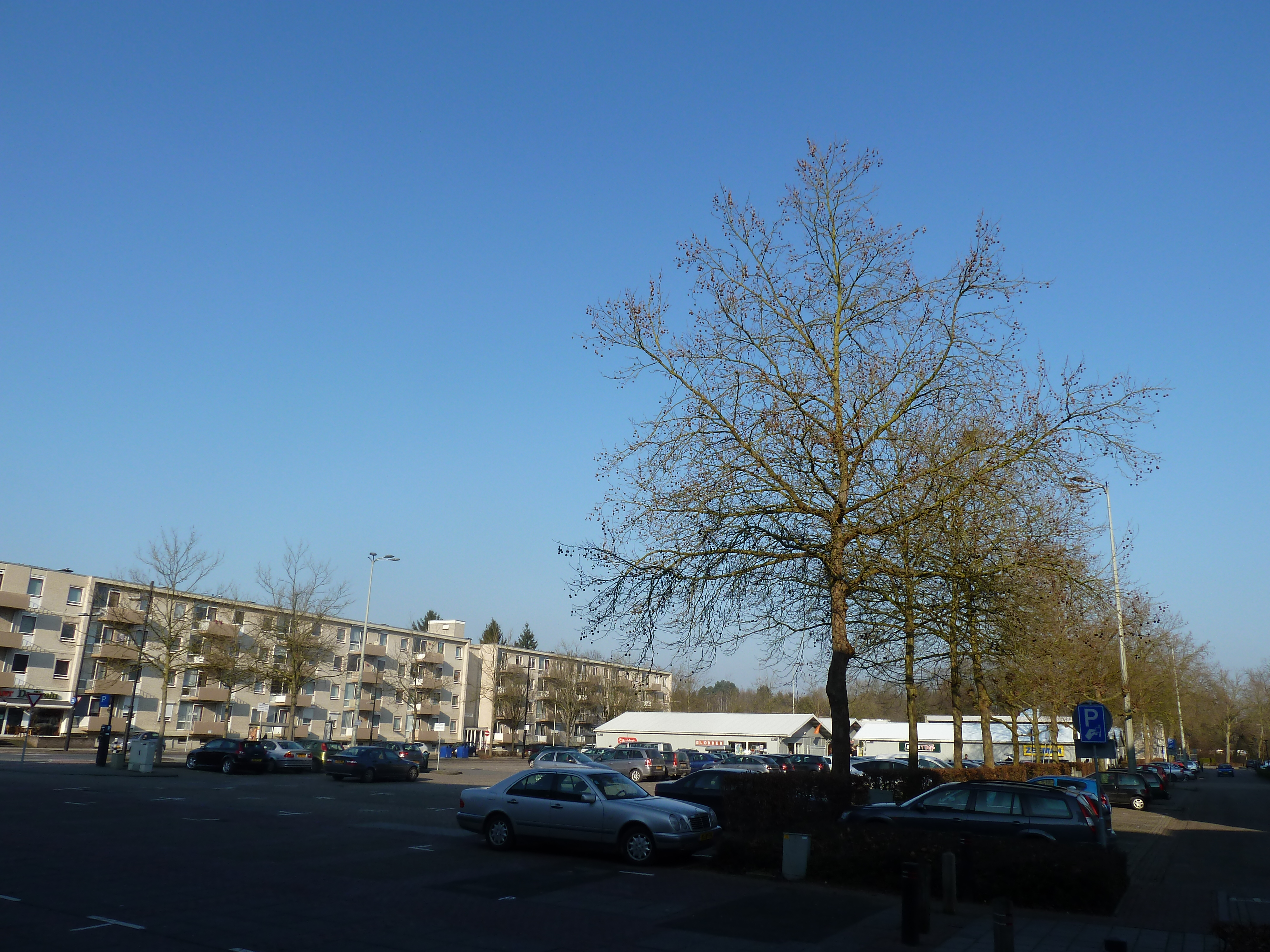 Berkelplein, Valkenburg, Limburg, nederland